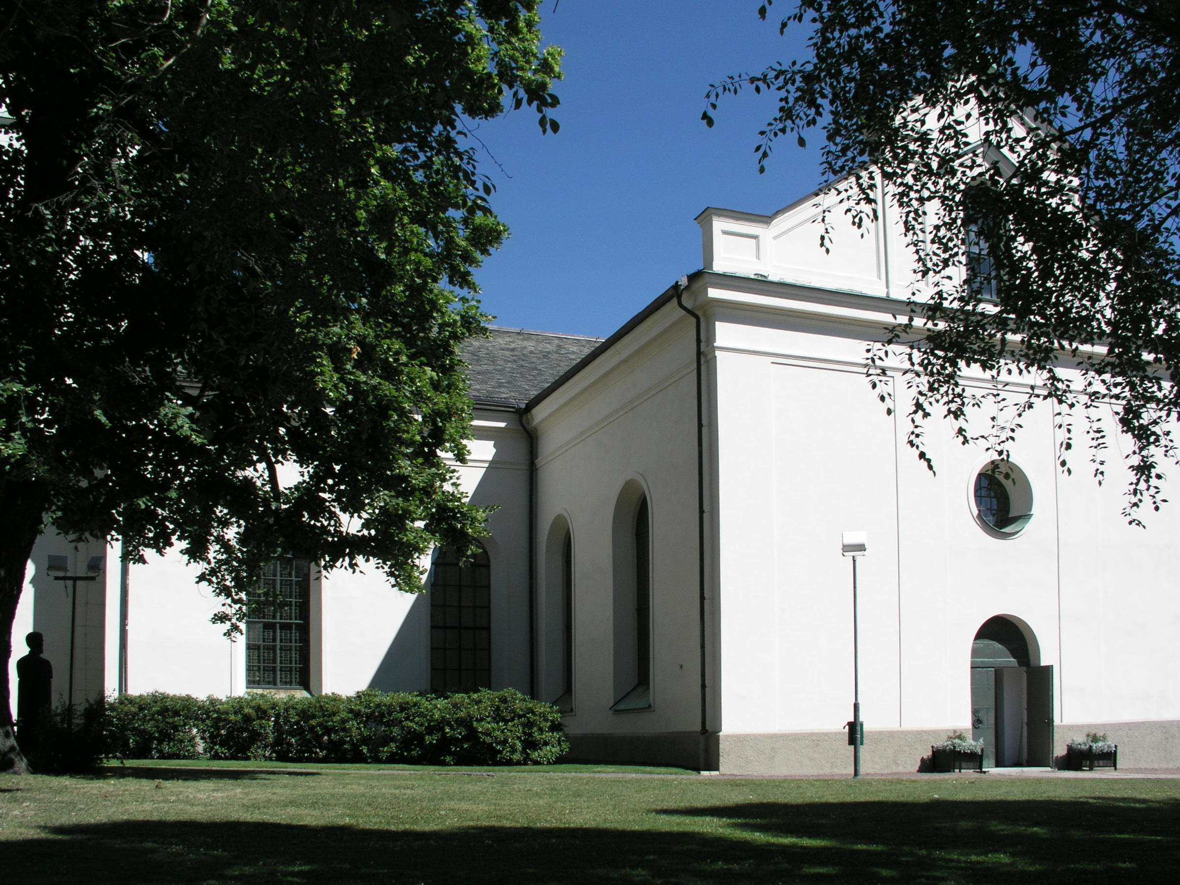 Karlstads domkyrka / Cathedral of Karlstad. View.